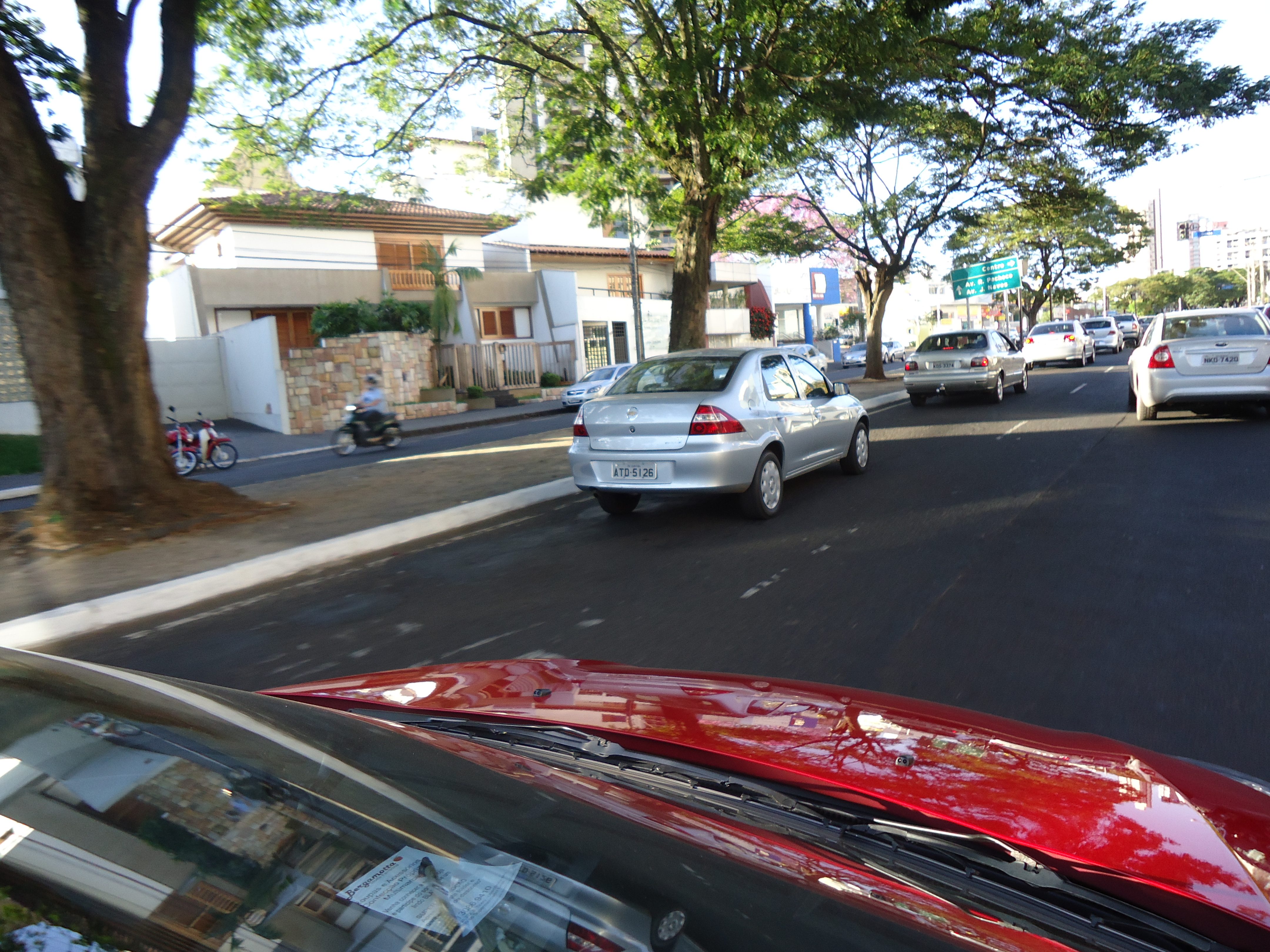 Av. Getúlio Vargas, antiga Av. Rio de Janeiro, no centro de Uberlândia.